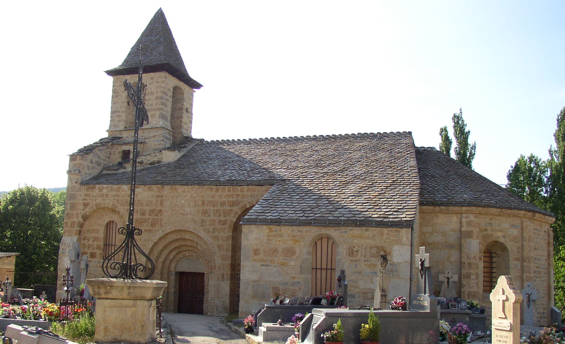 Eglise d'Esclanèdes vu depuis l'angle Sud-ouest du cimetière